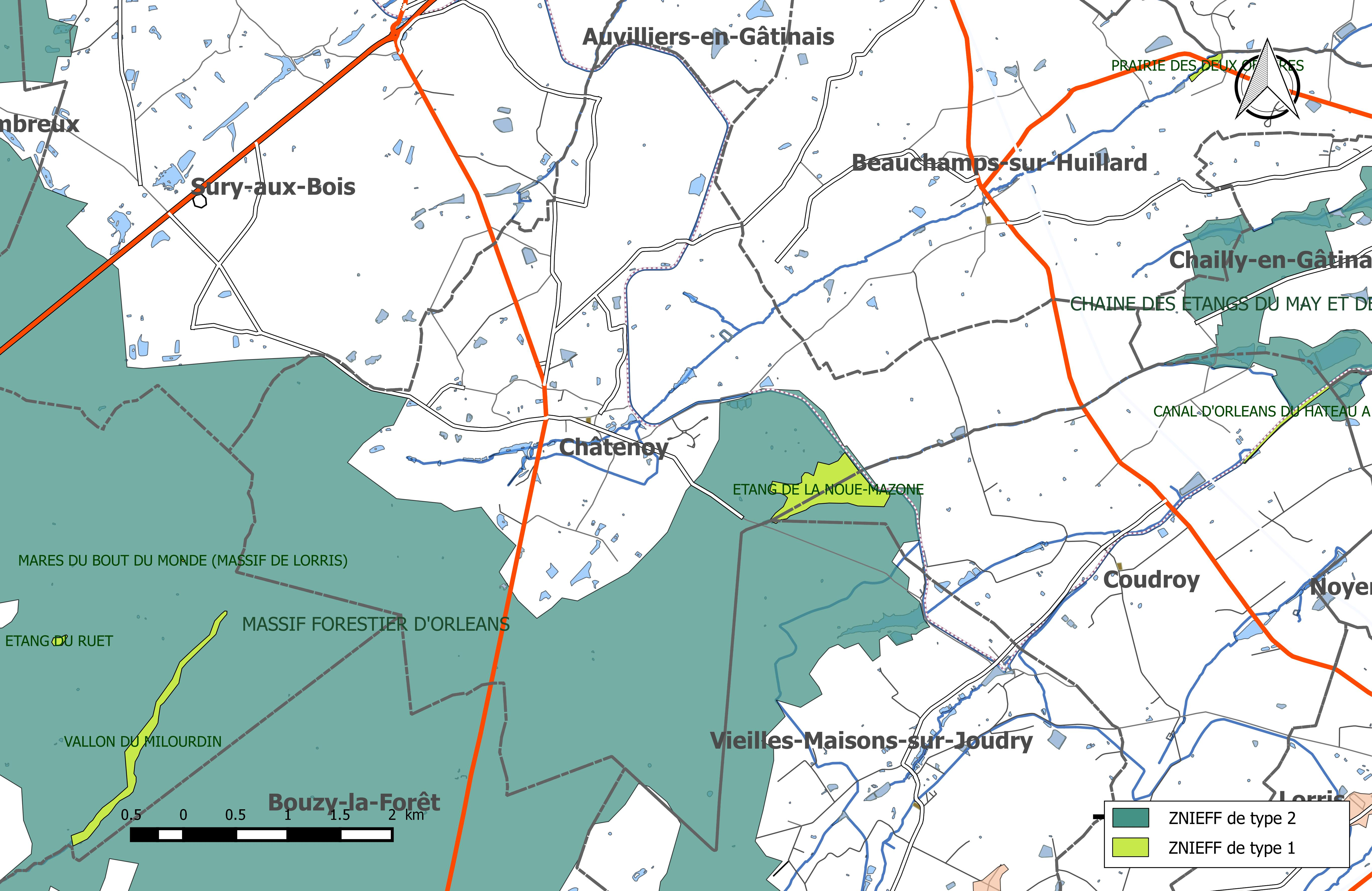 Carte des Zones naturelles d'intérêt écologique faunistique et Floristique (ZNIEFF) de la commune de Châtenoy (Loiret).